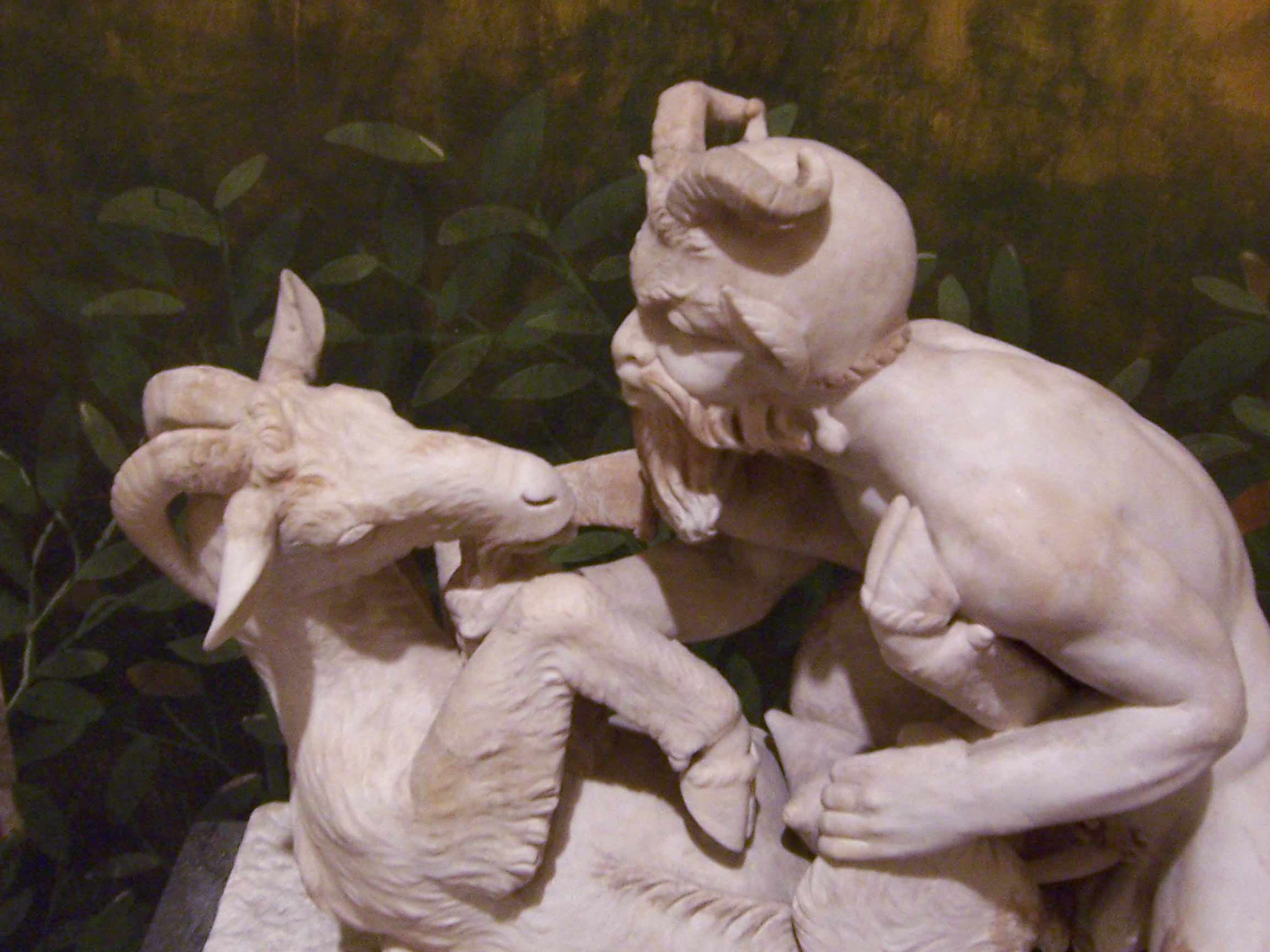 Pan e Capra - Museo Archeologico Nazionale di Napoli Ritrovato nella Villa dei Papiri ad Ercolano